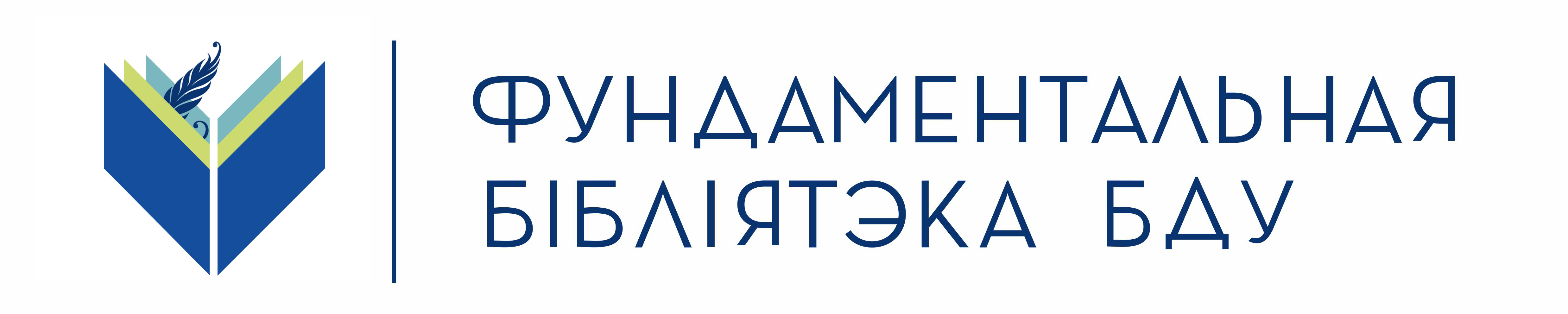 Логотип Фундаментальной библиотеки Белорусского государственного университета